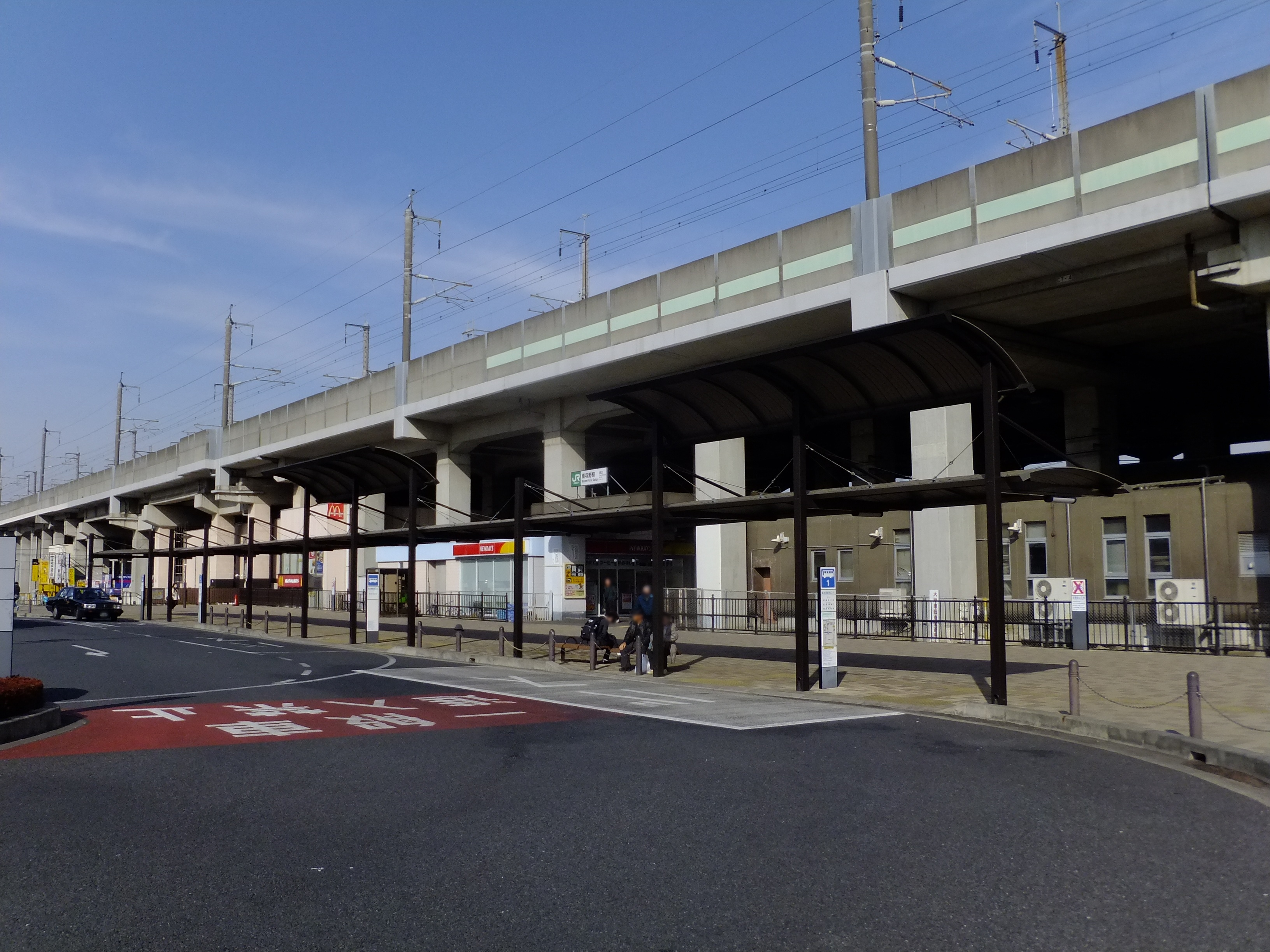 埼京線・南与野駅西口ロータリー